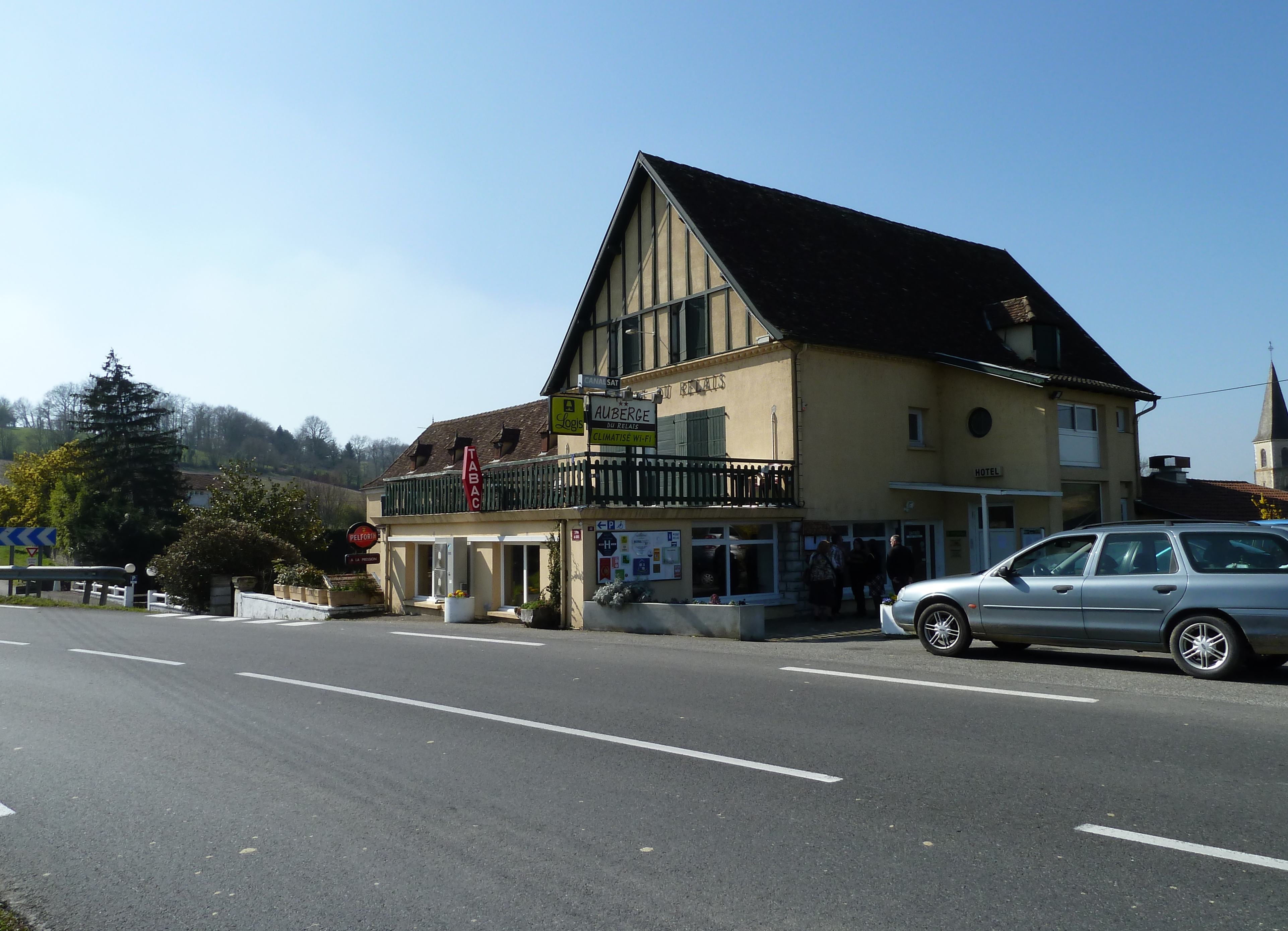 Auberge de Bérenx